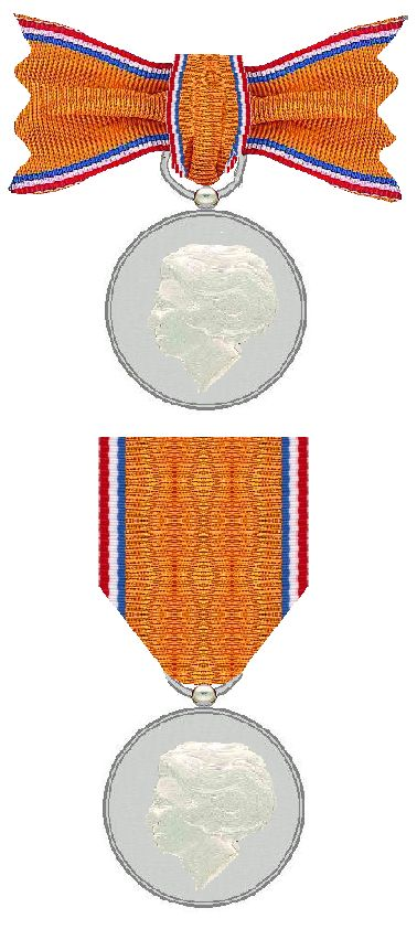 Herinneringsmedaille_Buitenlandse_Bezoeken Nederland